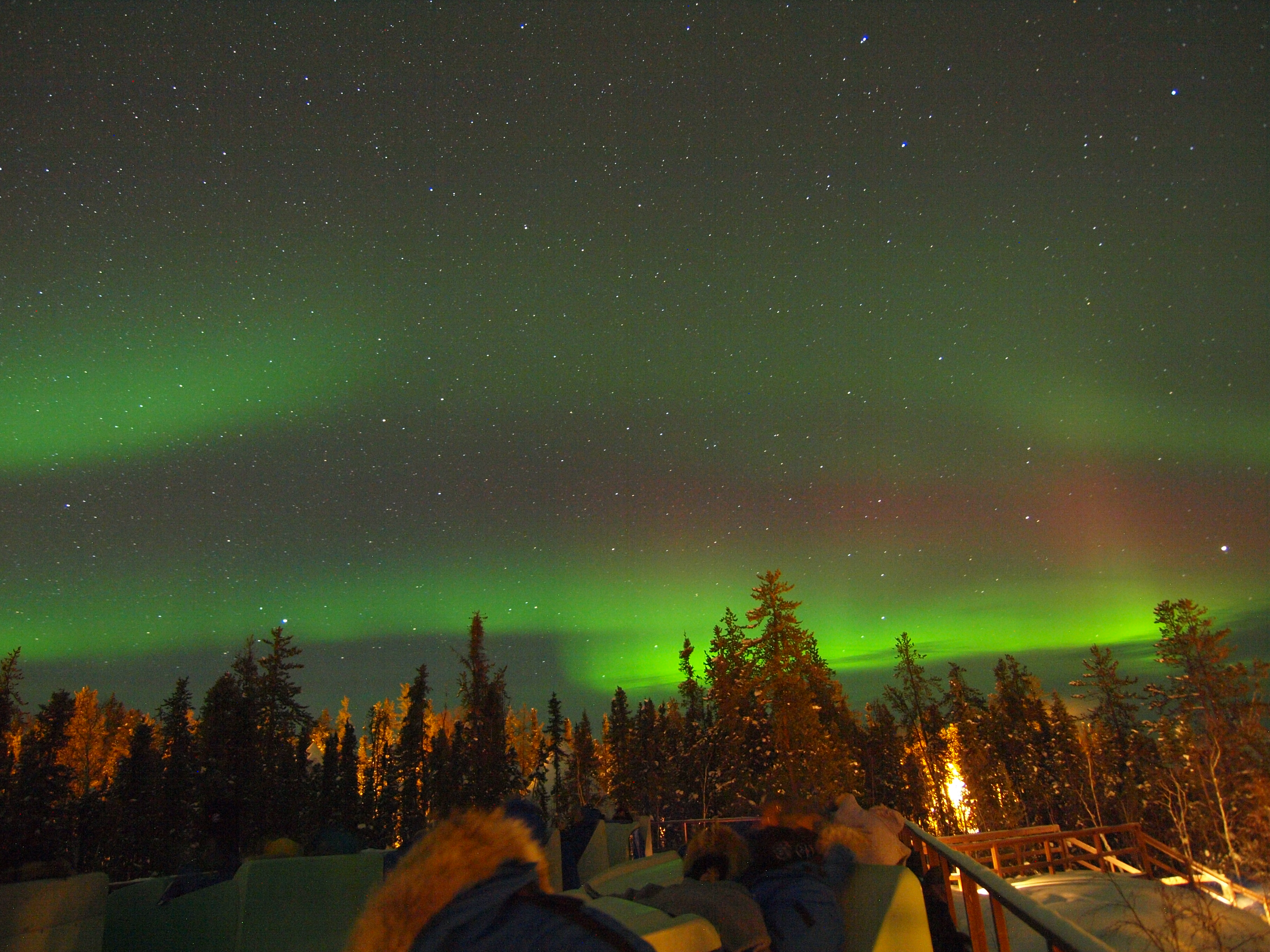 Yellow Knife , NWT , Canada